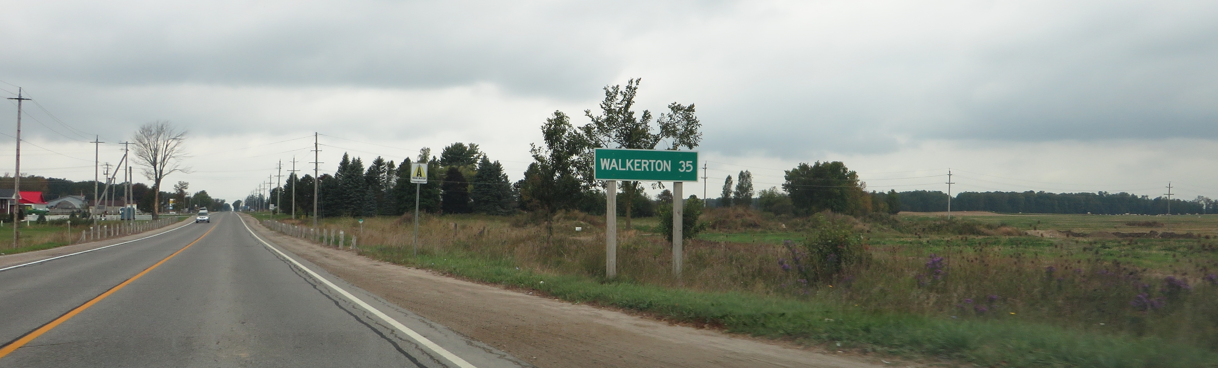 35 kilometres to Walkerton, Ontario